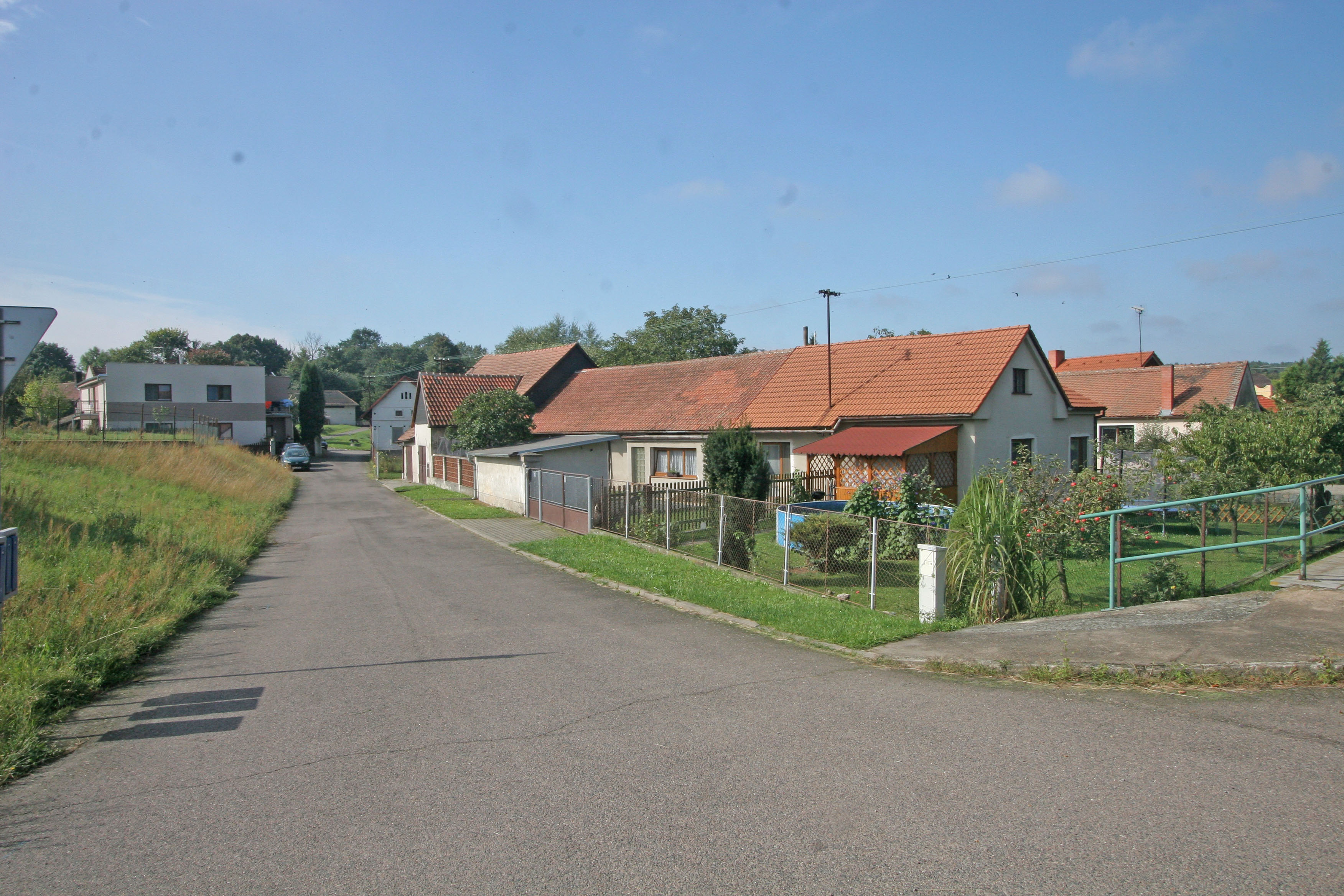 Jankovice čp. 2